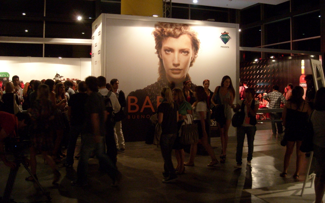 Un cartel de Milagros Schmoll en BAFWeek 2010